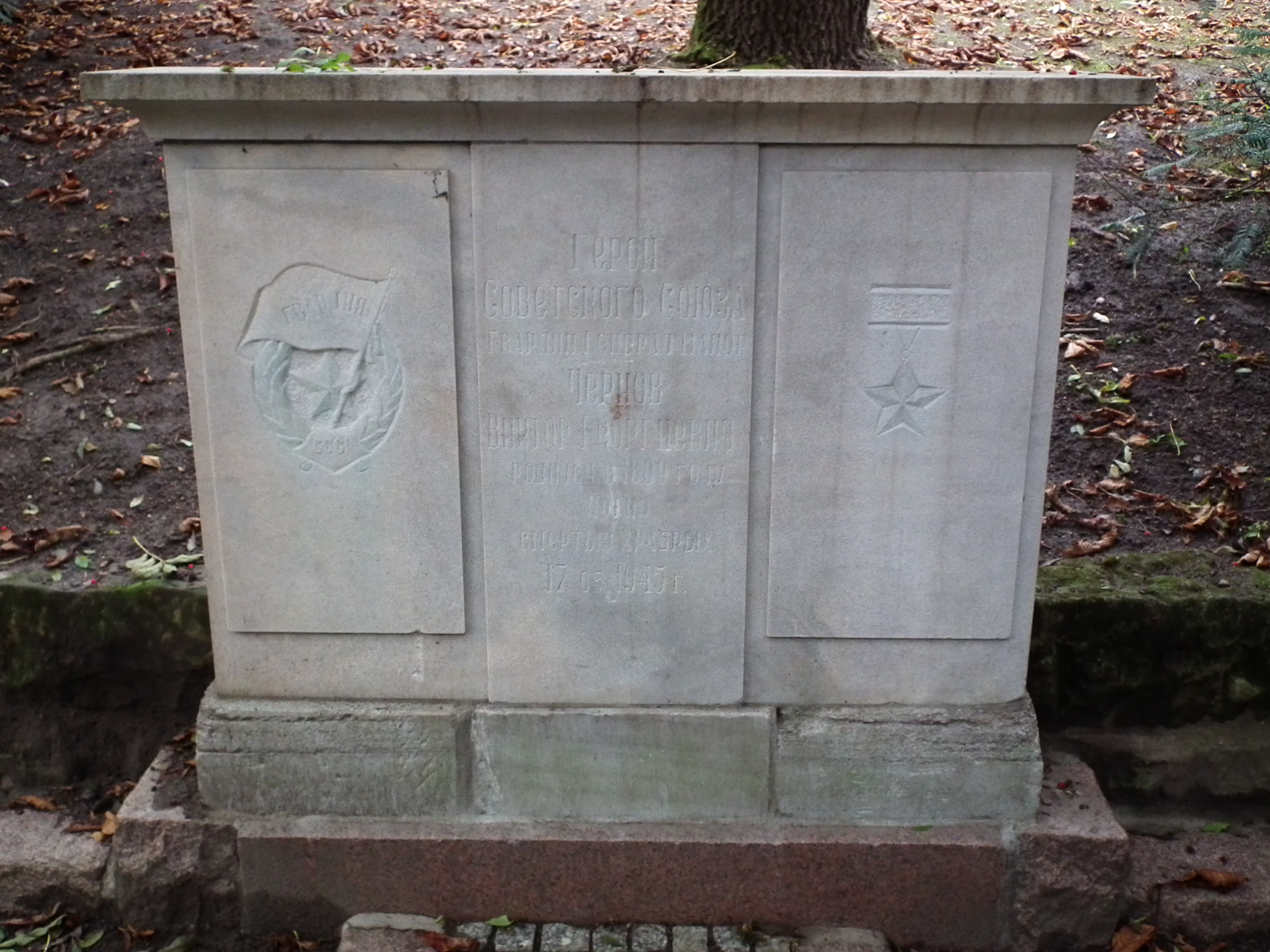 Grób Wiktora Czernowa w Poznaniu, na Cytadeli.